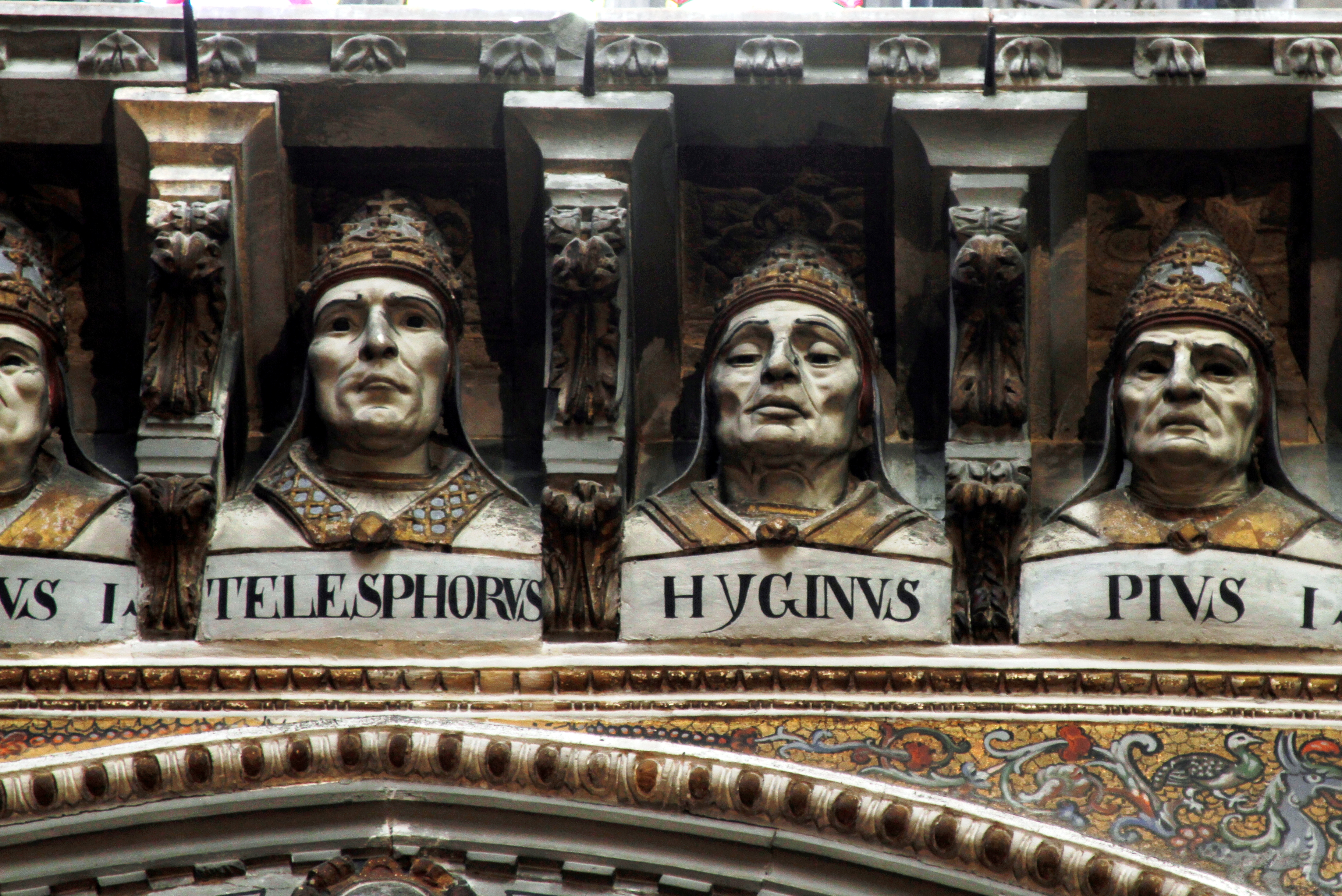 Duomo - Siena